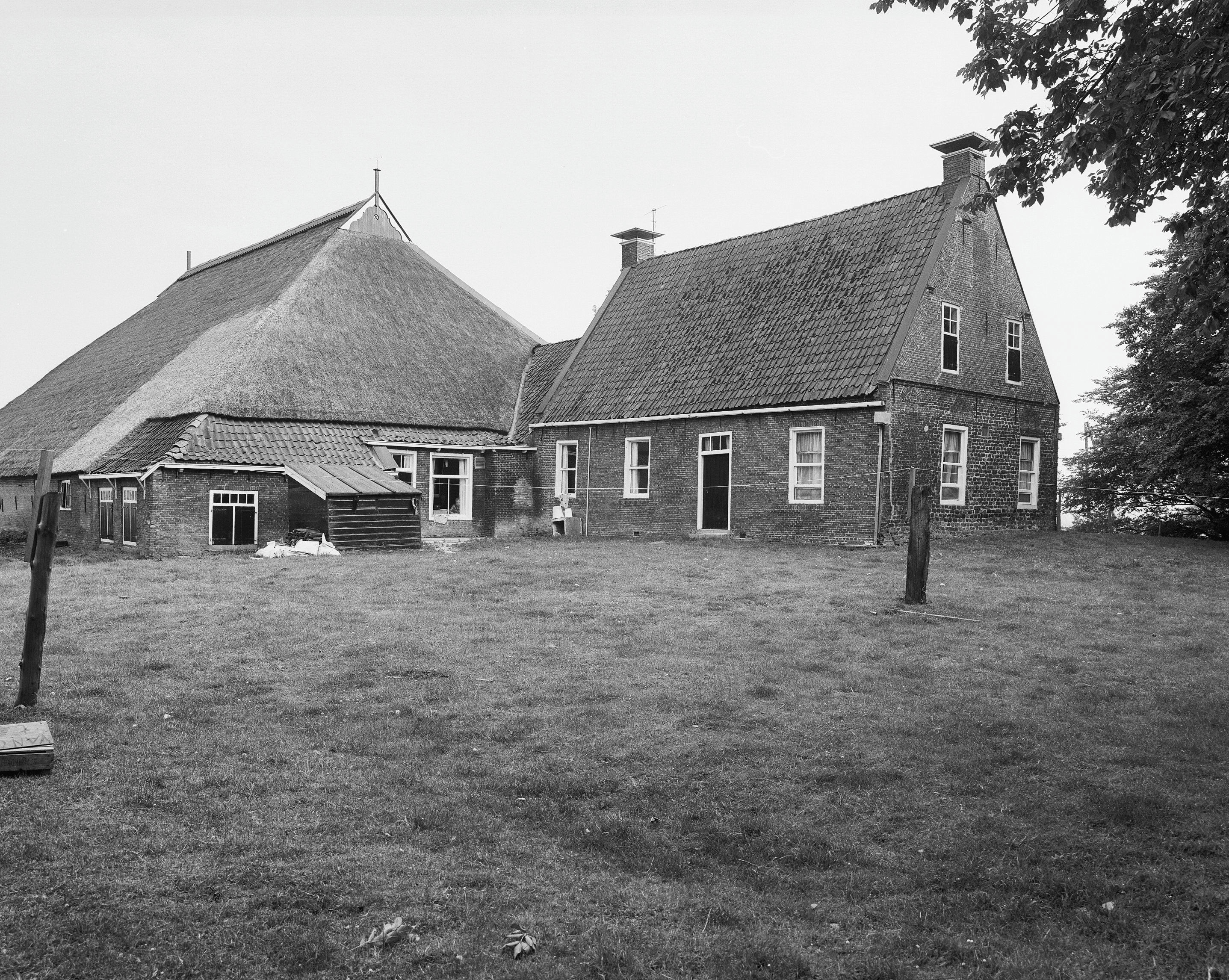 Stinstra State: Overzicht van kop-hals-rompboerderij (opmerking: Boerderij A5)